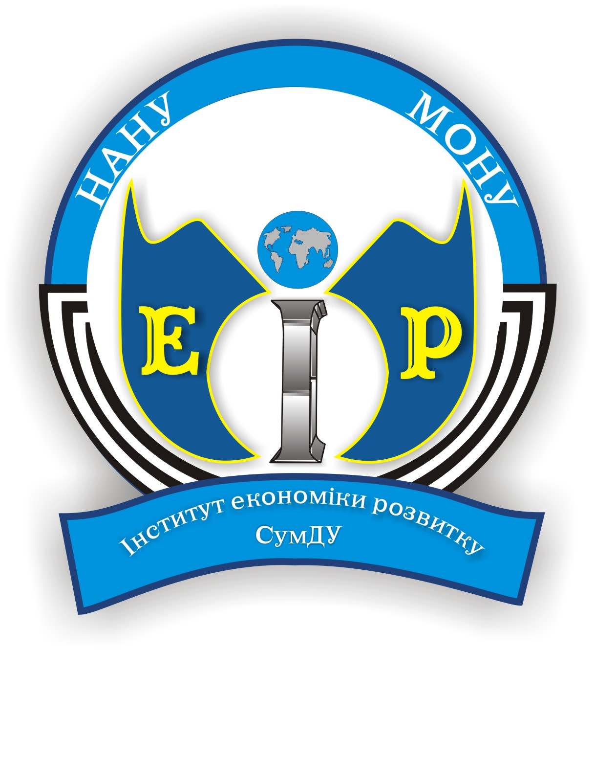 Логотип НД ІЕР